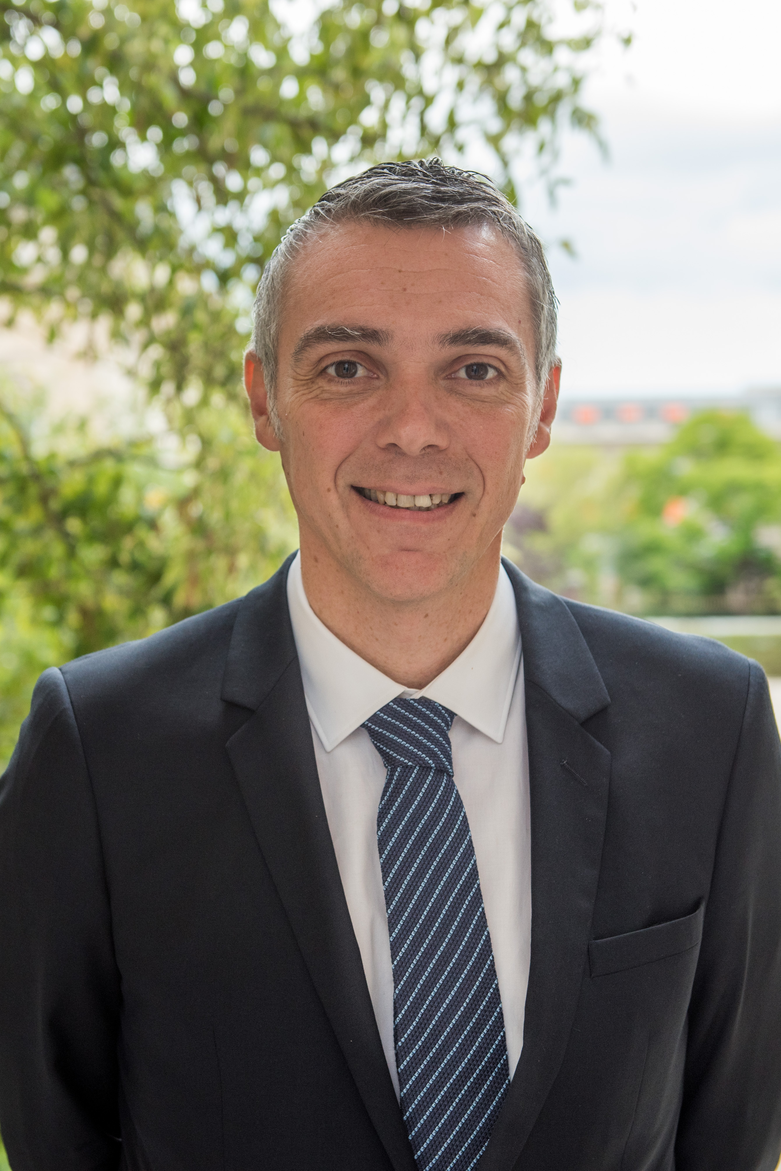 Jean-François Cesarini dans le jardin des Quatre colonnes du palais Bourbon en 2017.